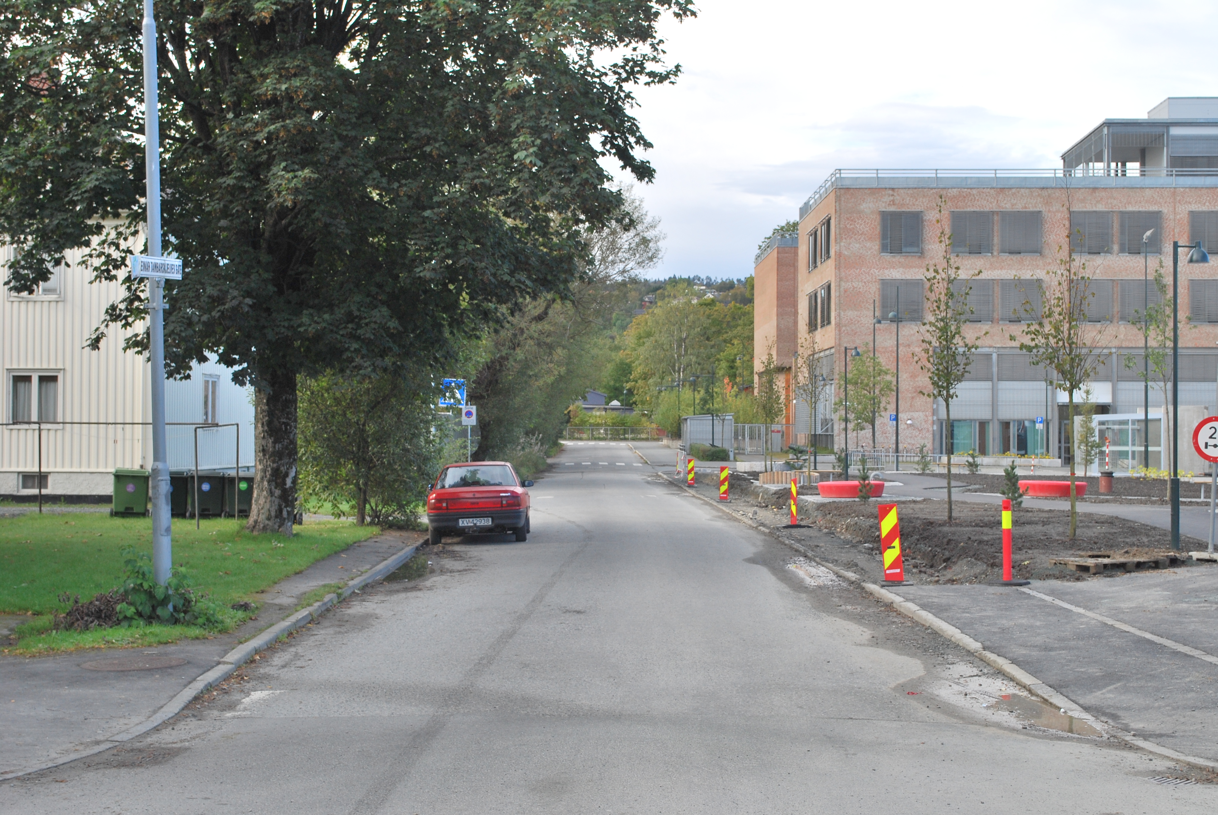 Einar Tambarskjelves gate i Trondheim, med deler av Laboratorietsenteret til St. Olavs Hospital mot høyre.